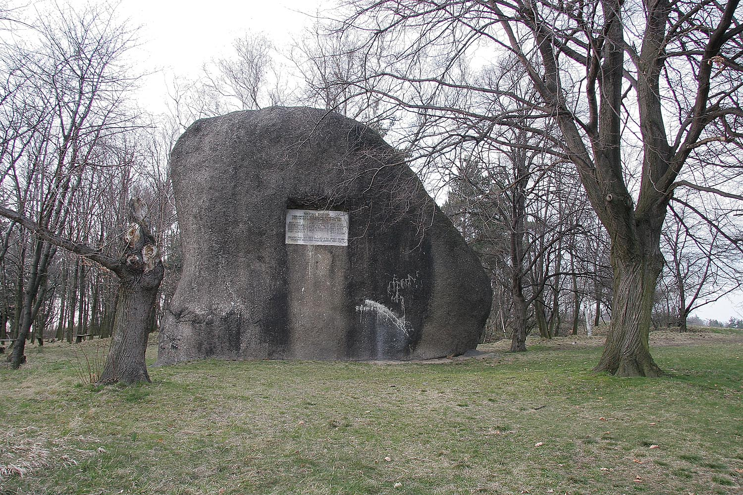 Přírodní památka Klepec - kamenný útvar Slouha